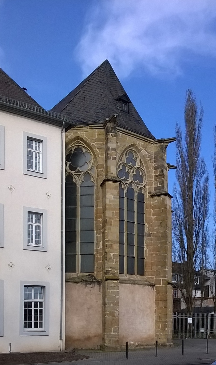 Trier, ehemalige Augustinerkirche